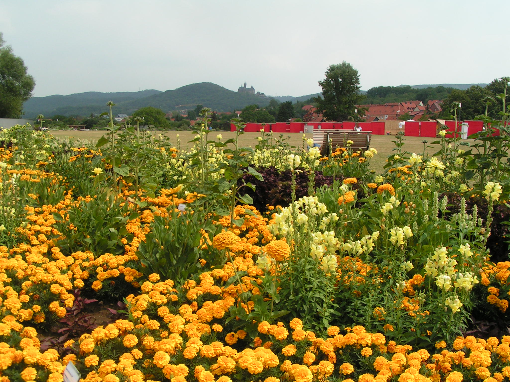 Landesgartenschau Wernigerode 2006